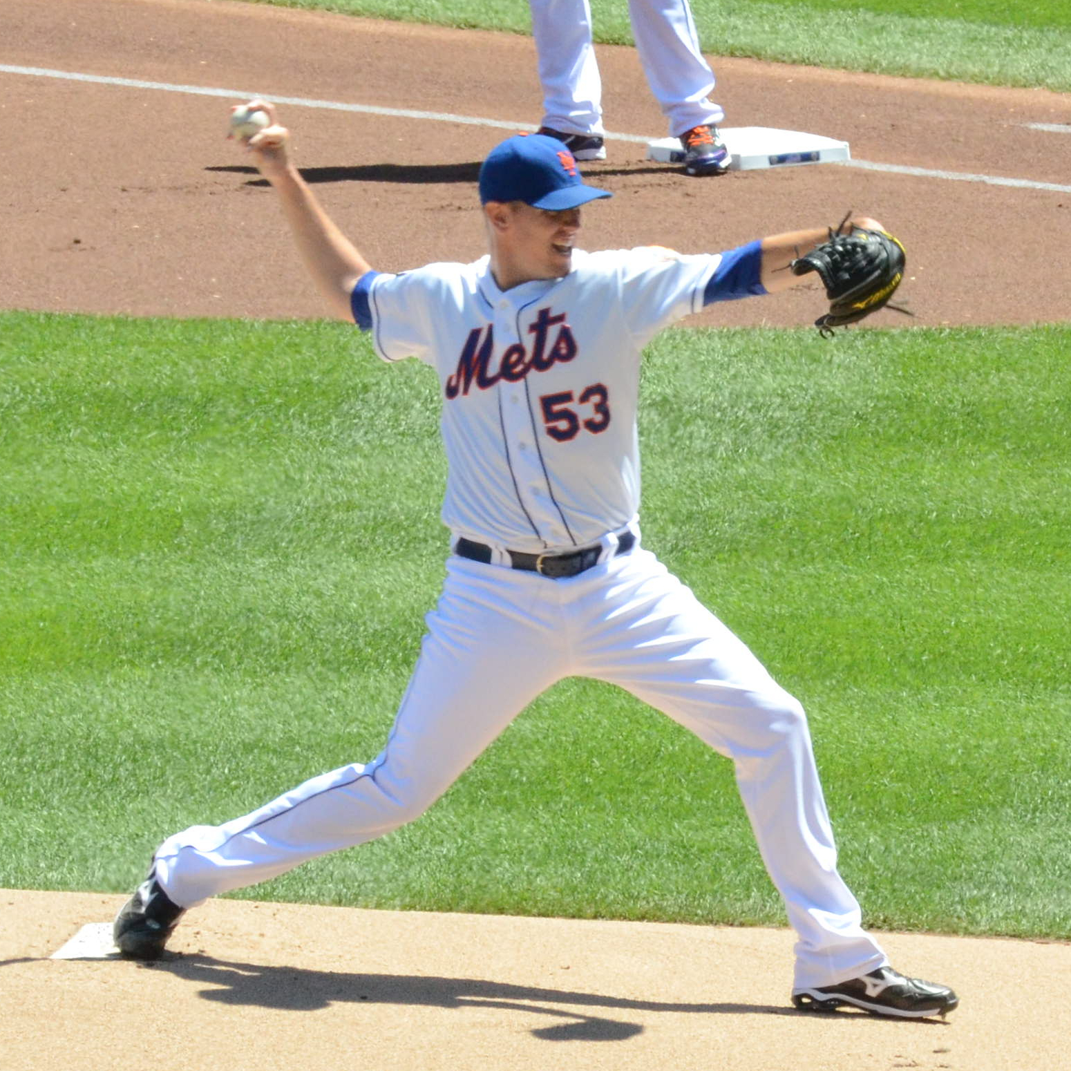 Jeremy Hefner